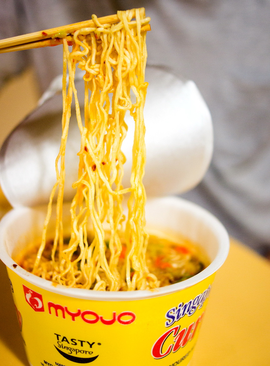 「シンガポール・カレー風味ヌードル」。日清食品のシンガポール法人[1]が明星ブランドで販売する即席麺。